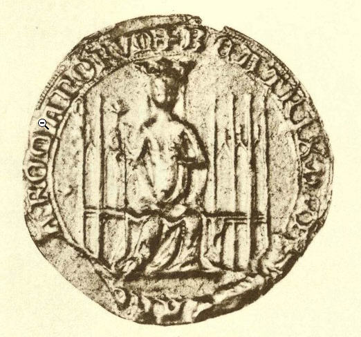 This is a scan of the historical document: Title: Die Siegel der deutschen Kaiser und Könige v. 1 (751 - 1347)